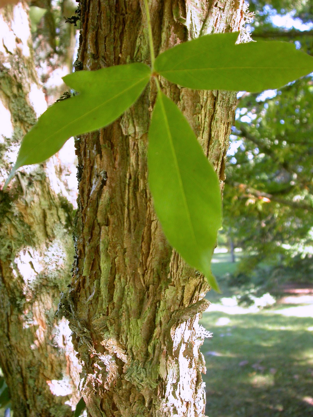 Acer triflorum bark